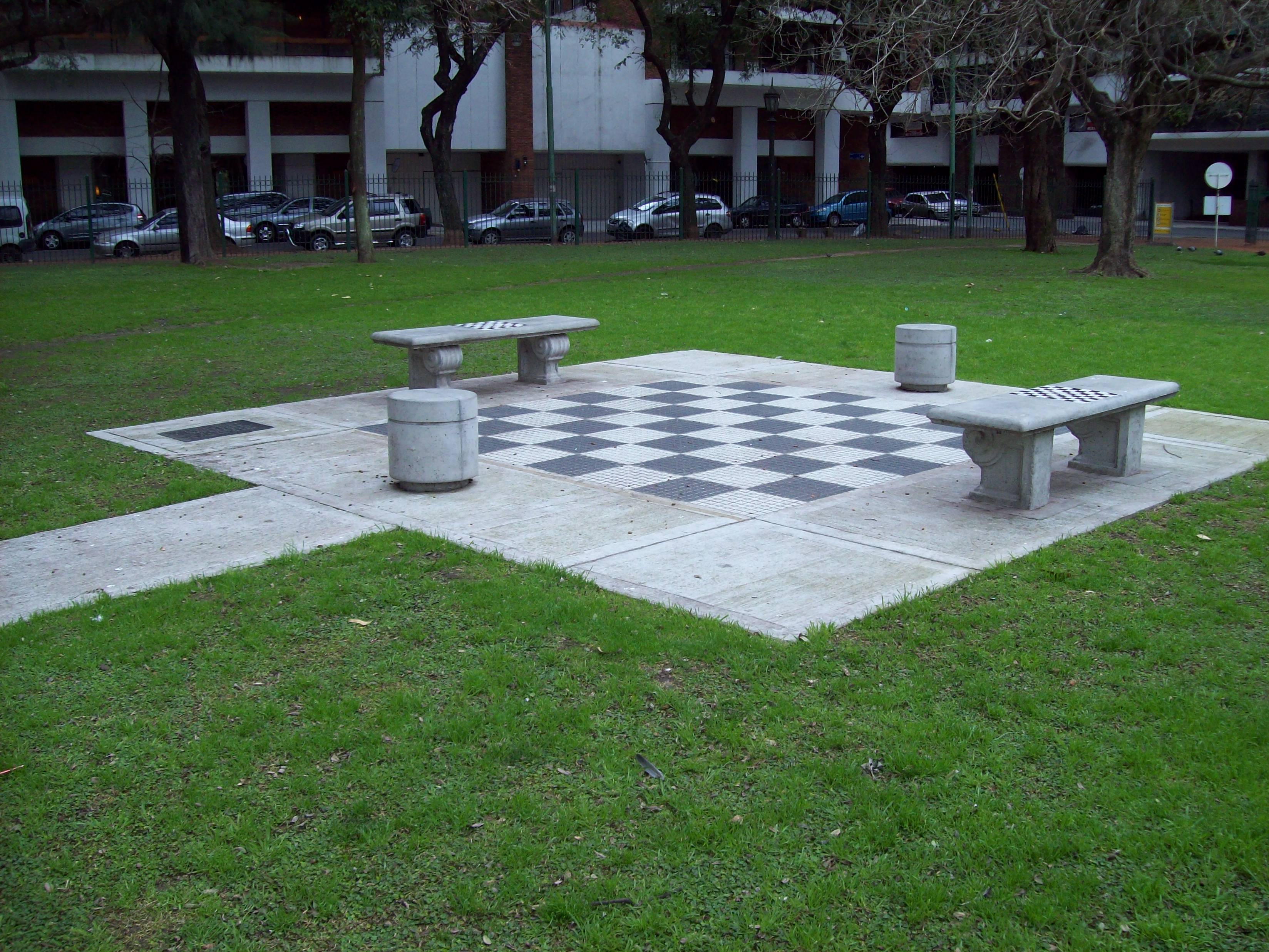 Un ajedrez gigante como "regalo" por parte de Alemania a Argentina por el Bicentenario. Este "monumento" se encuentra en la Plaza Alemania, Buenos Aires.